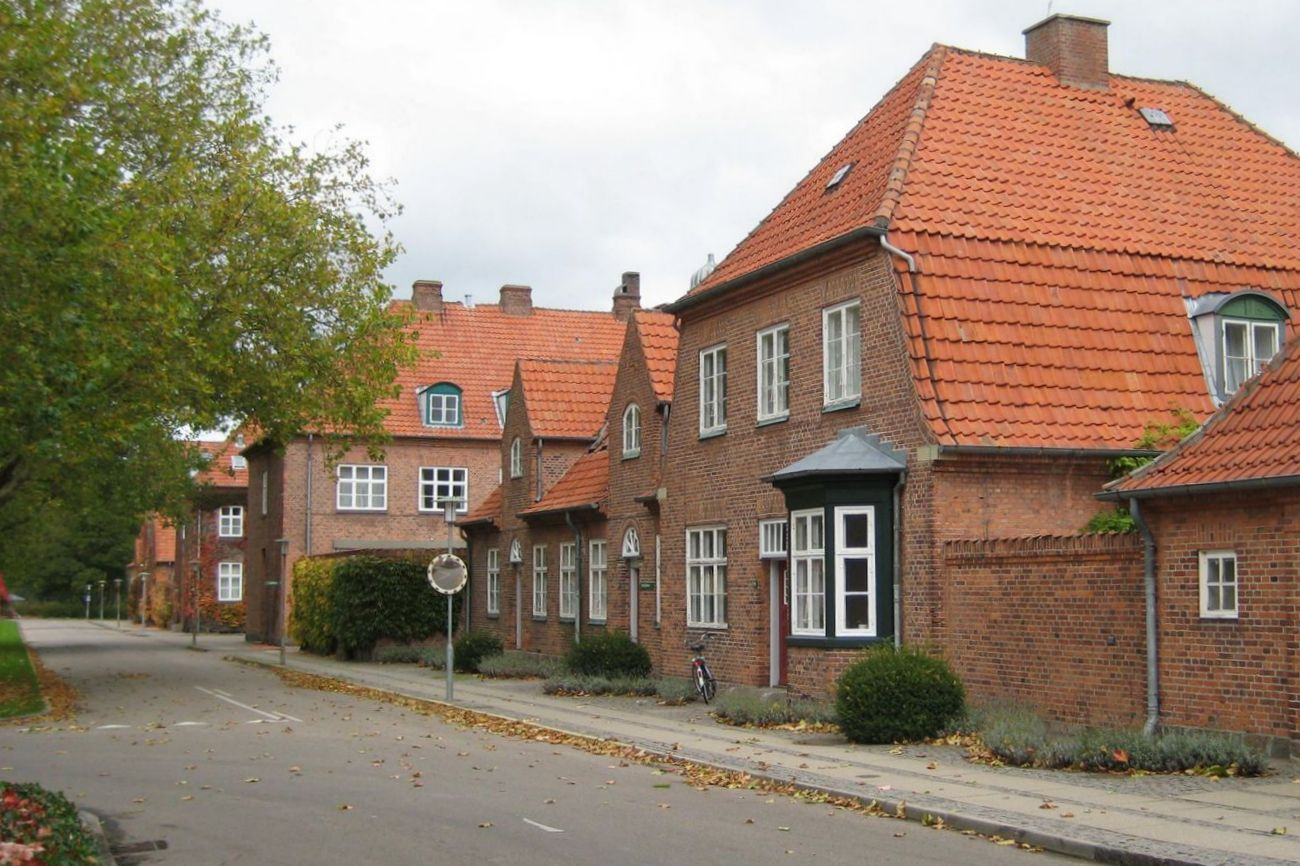 Lægeboliger på Sindssygehospitalet i Nykøbing Sjælland.